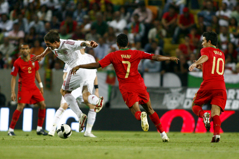 Jose Bosingwa (2), Daniel Agger (4), Nani (7), Deco (10); Portugal 2-3 Denmark, Lisbon September 10 2008